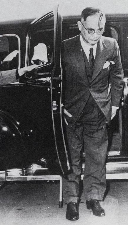 Mamoru Shigemitsu / 重光葵